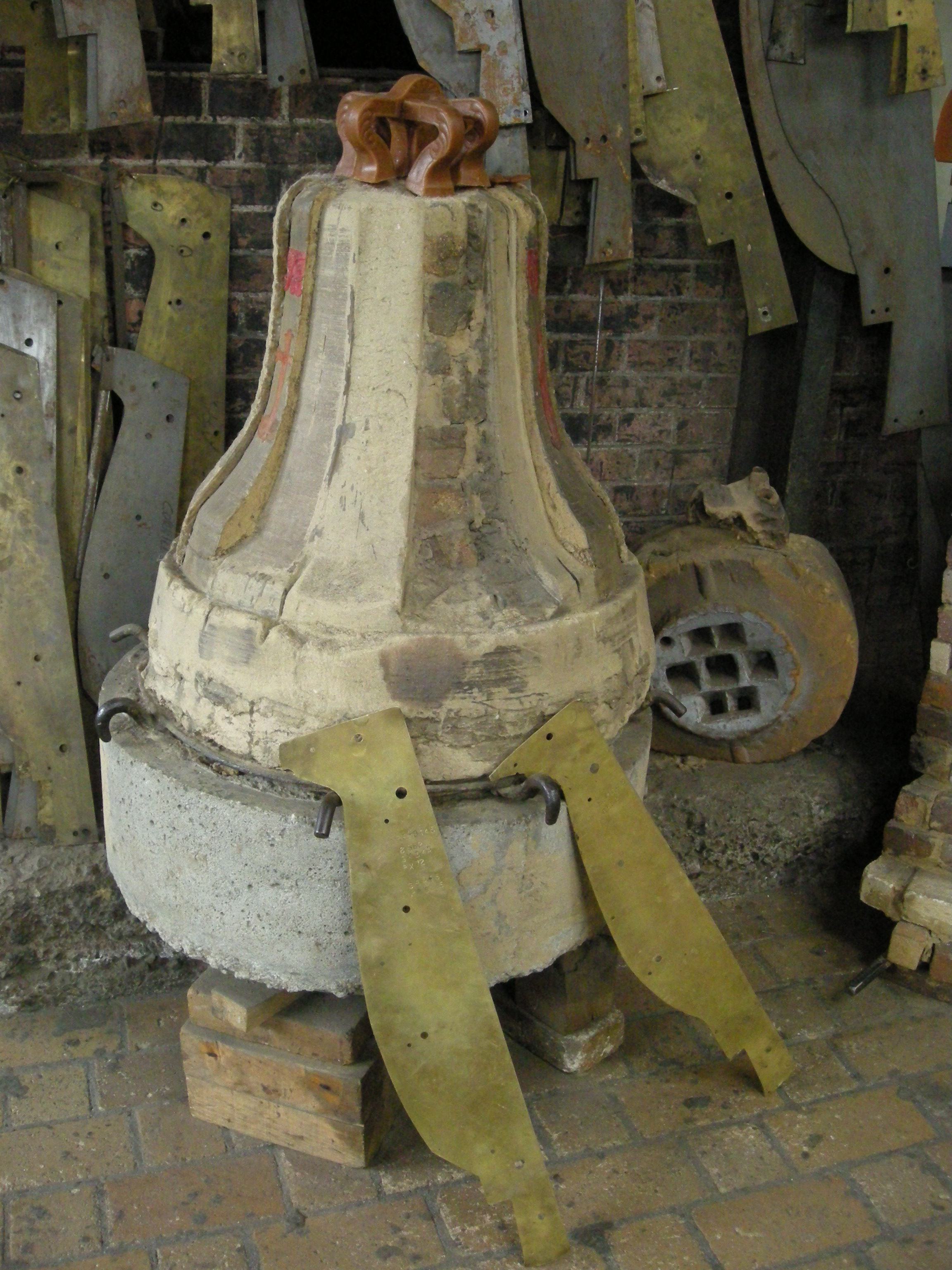 Fonderie de cloches Cornille-Havard à Villedieu-les-Poêles (Manche, Normandie). Les briques du noyau sont recouvertes de plusieurs couches de "terre" (argile, poils de chèvre et crottin de cheval) lissées avec le gabarit interne